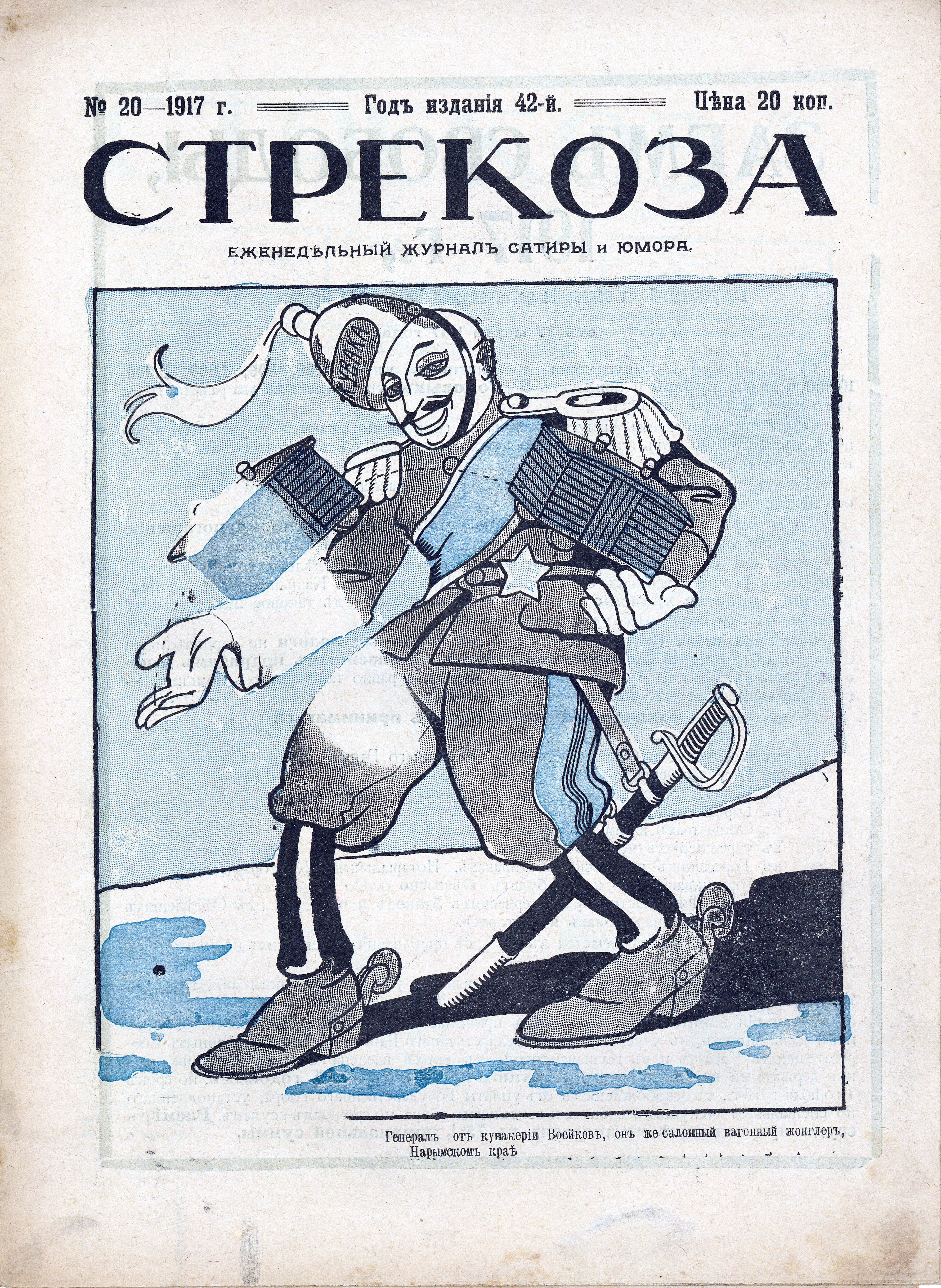 Обложка журнала "Стрекоза", № 20, 1917 год. Карикатура на генерала Владимира Николаевича Воейкова. Подпись: "Генерал от кувакерии Воейков, он же салонный вагонный жонглёр, в Нарымском крае"